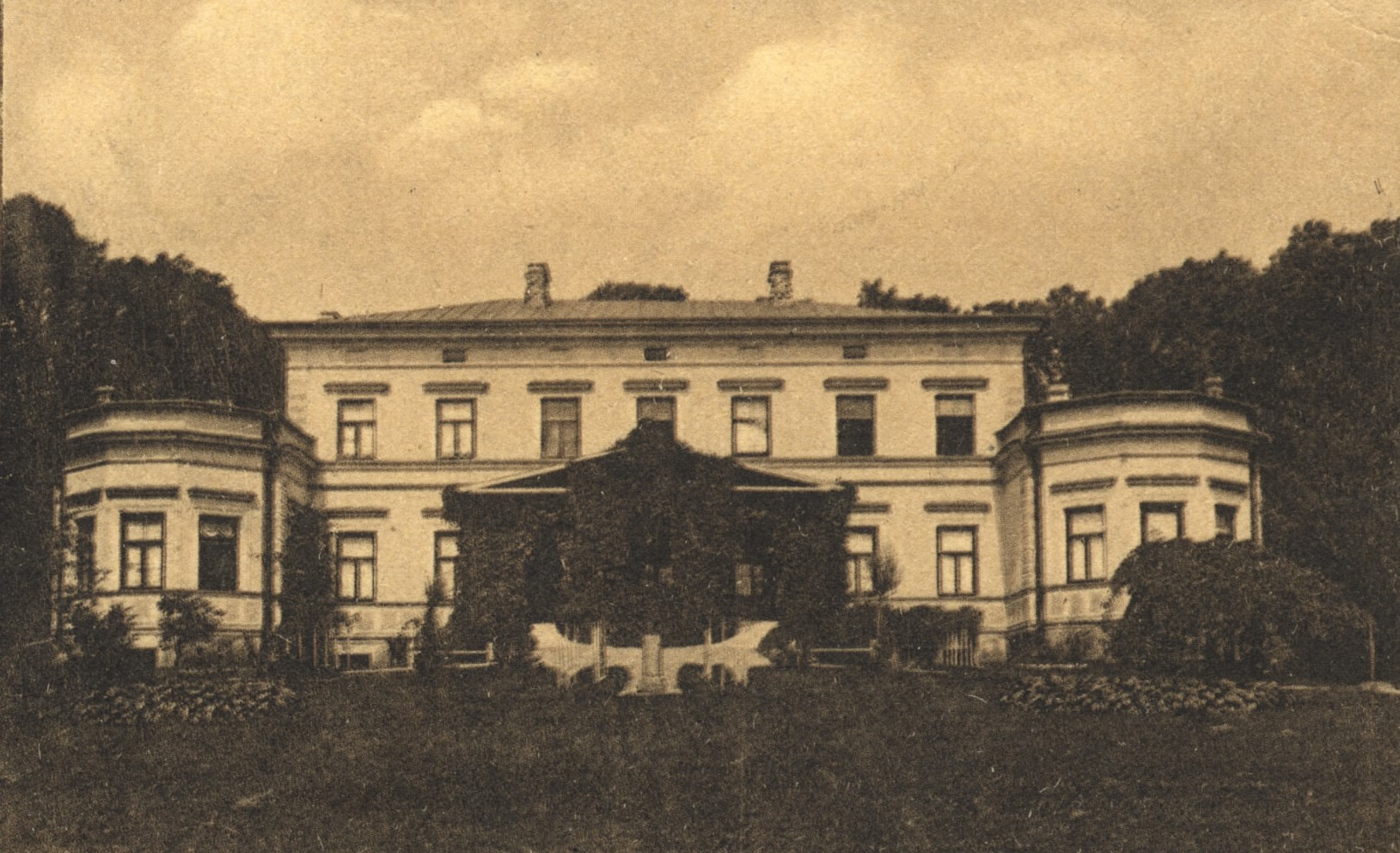 Беларуская (тарашкевіца): Станькаў (Stańkaŭ), сядзіба Чапскіх (Čapski)